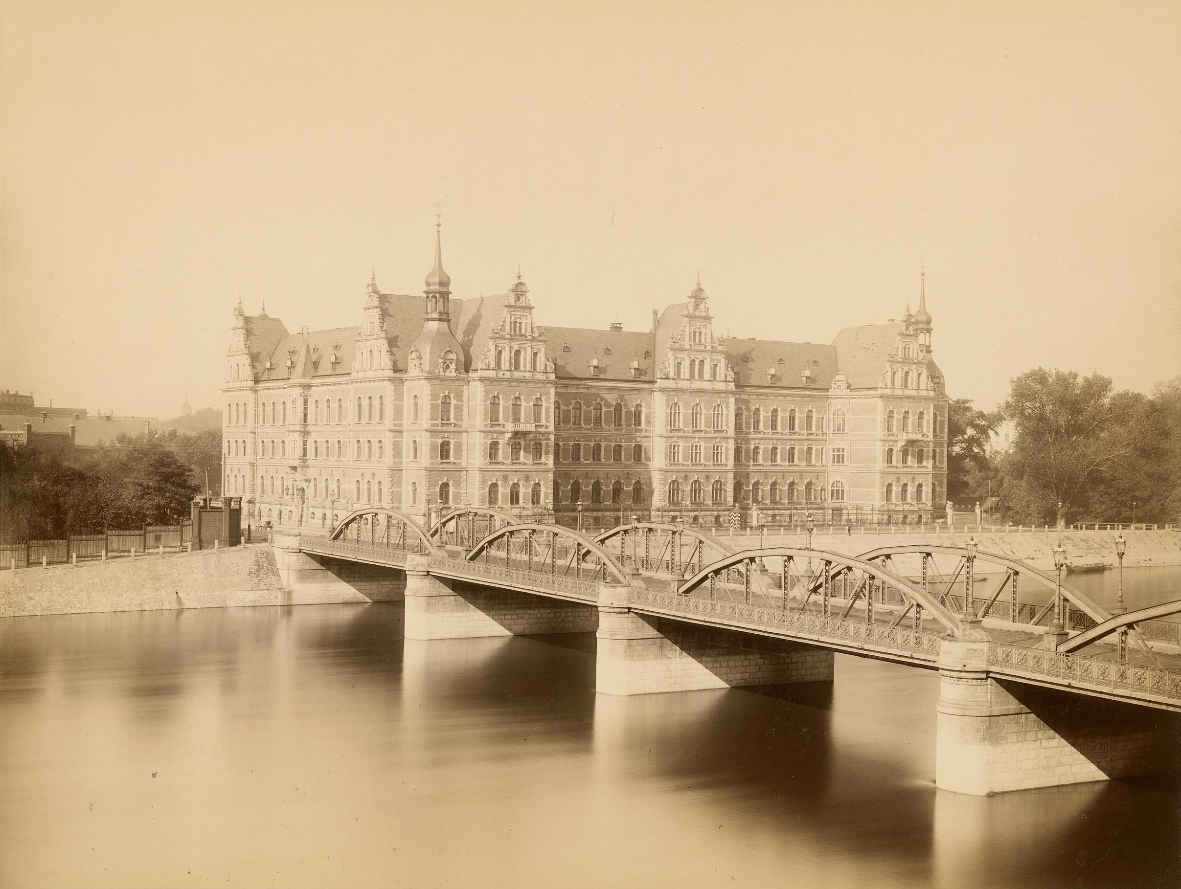 Regierungsgebäude von NO mit Lessingbrücke, Breslau.